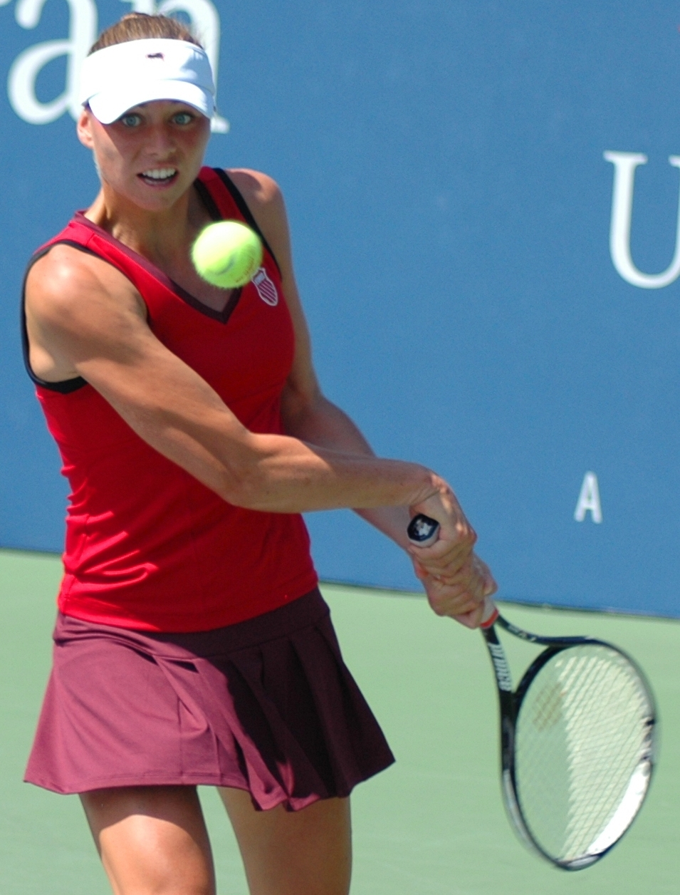 Vera Zvonareva US Open 2009